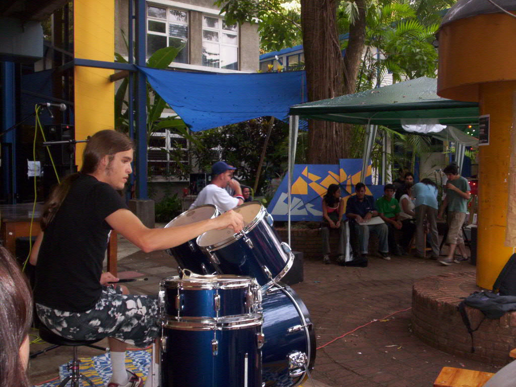 mi propio trabajo, Semana Universitaria 2005